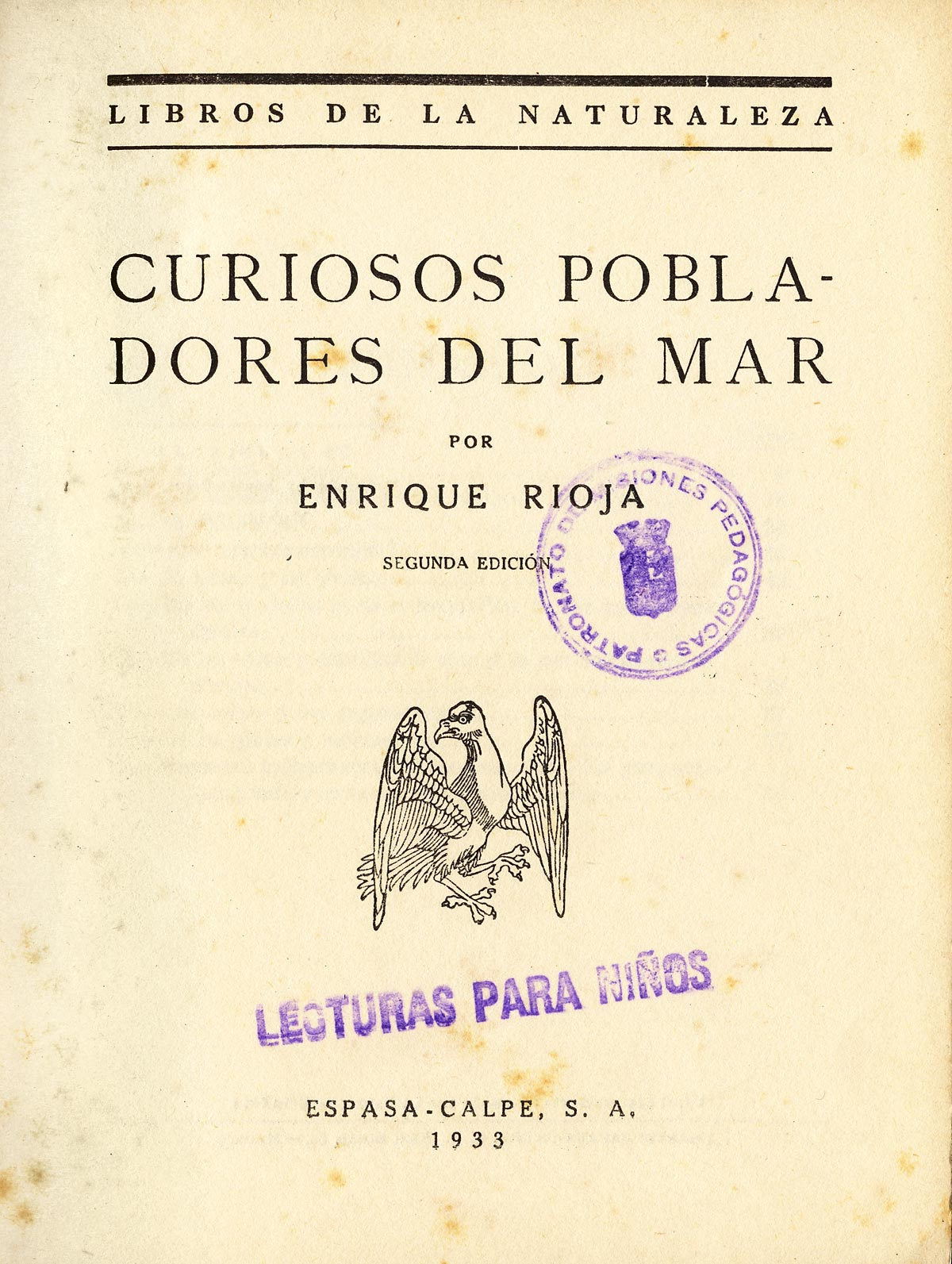 Portada del libro «Curiosos pobladores del mar», de Enrique Rioja Lo Bianco; editorial Espasa-Calpe, Madrid, 1933. Sello del Patronato de Misiones Pedagógicas.